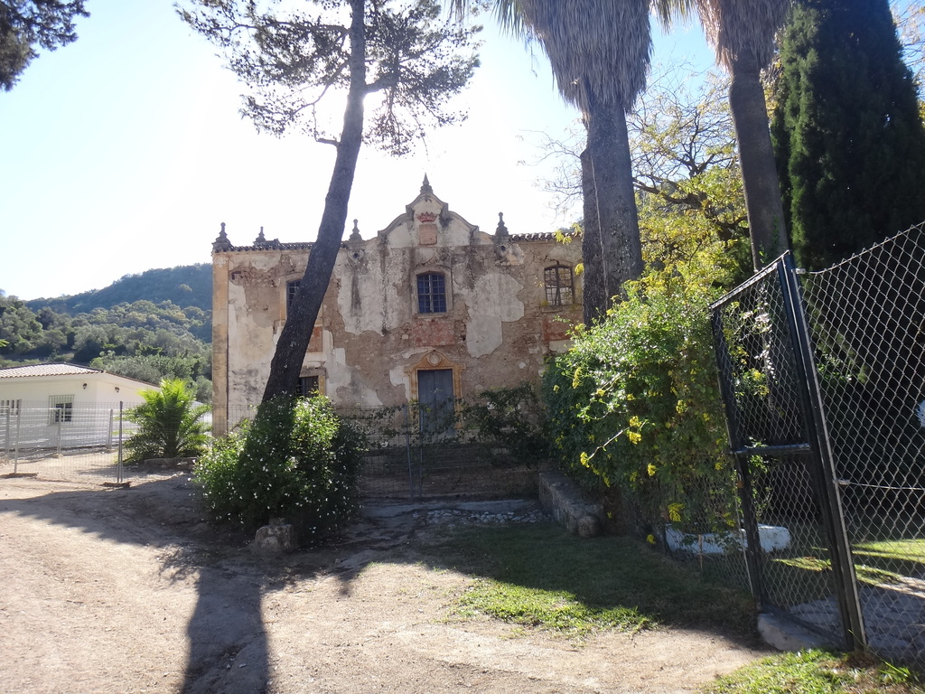 Tempul, Algar (Andalucía, España)